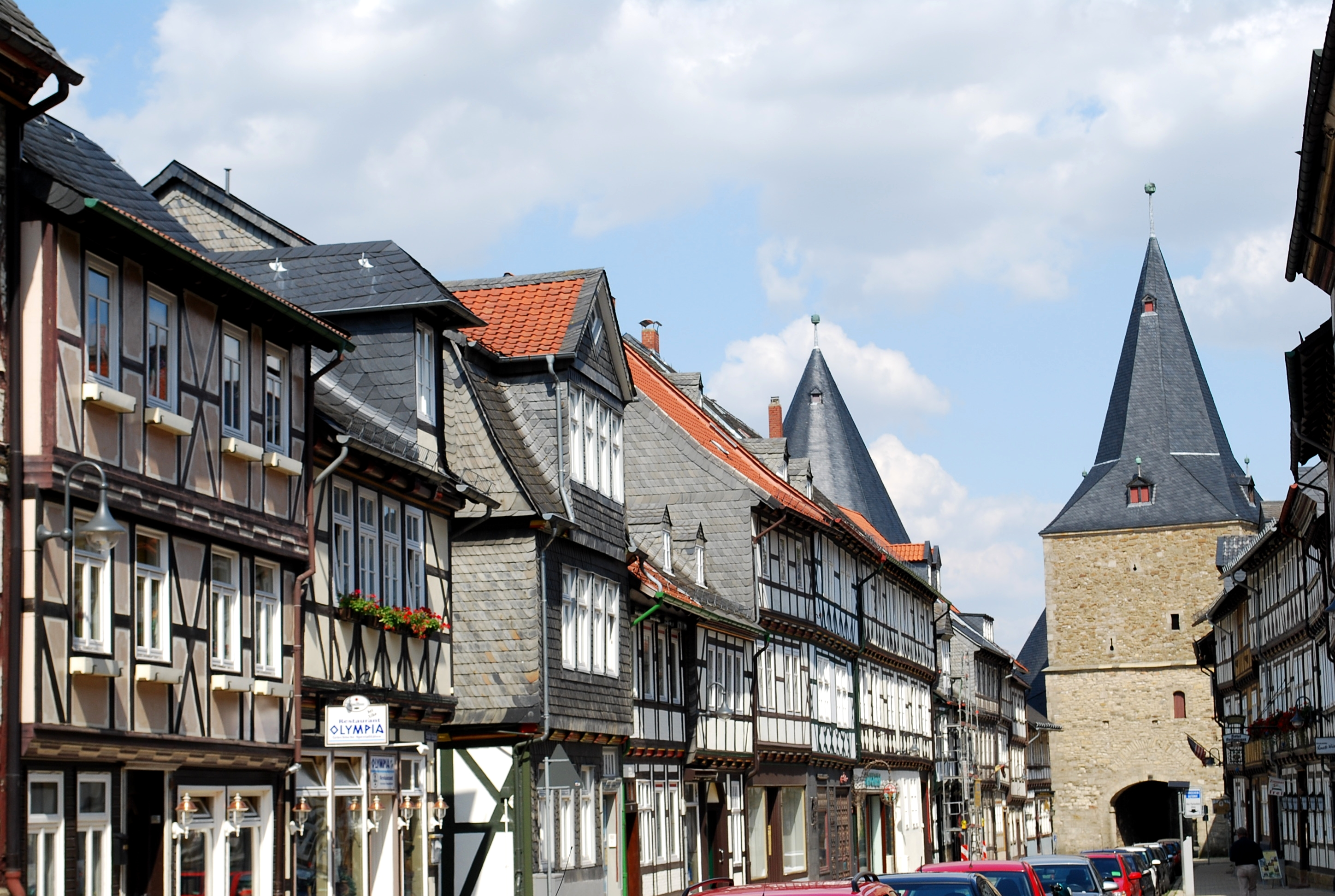 Гослар